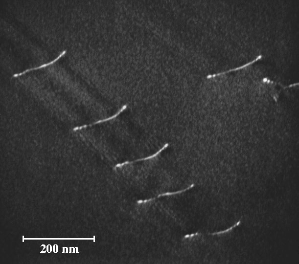 TEM-Aufnahme von Versetzungen in einer Legierung